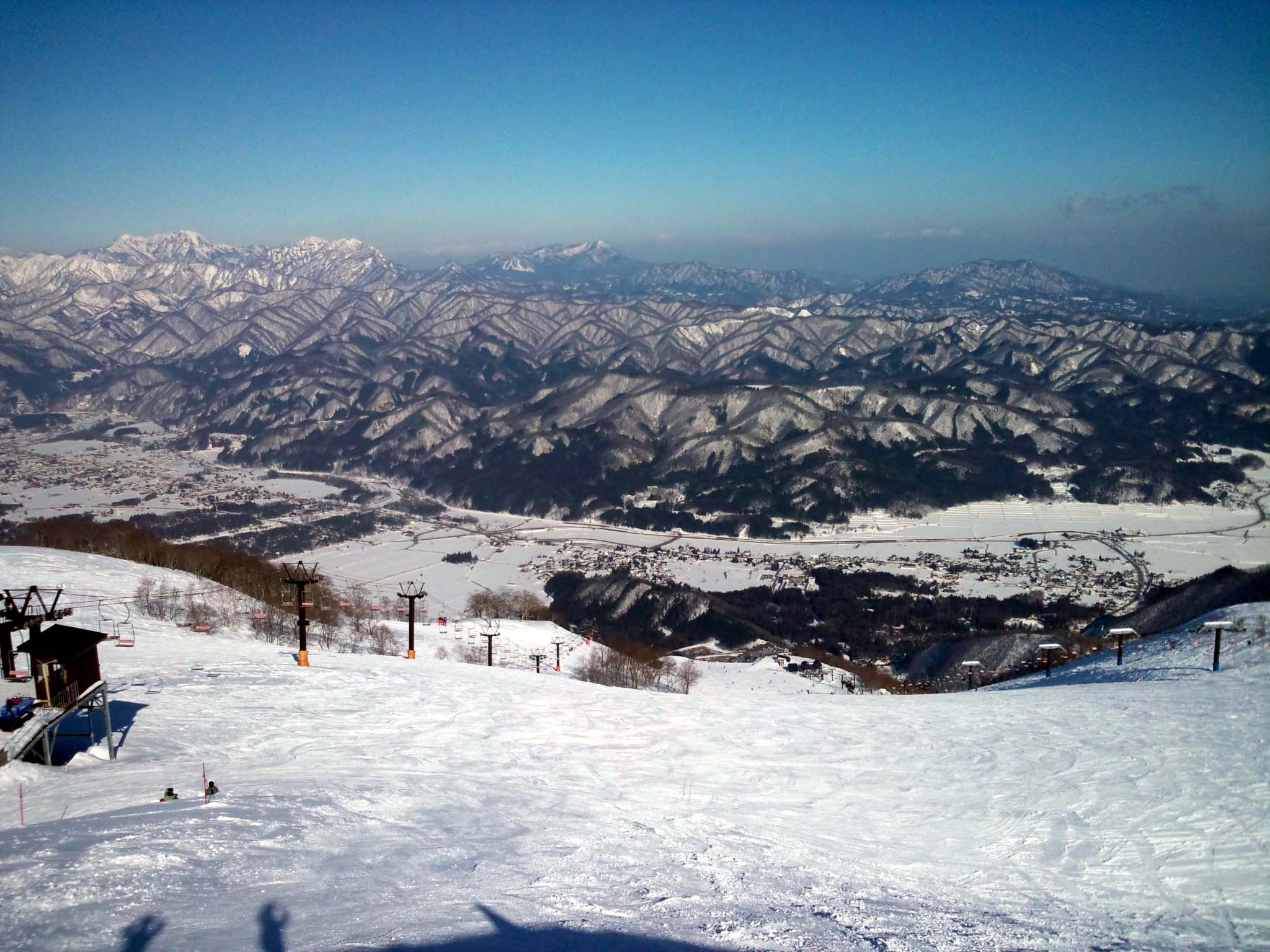 五竜スキー場山頂からの眺め